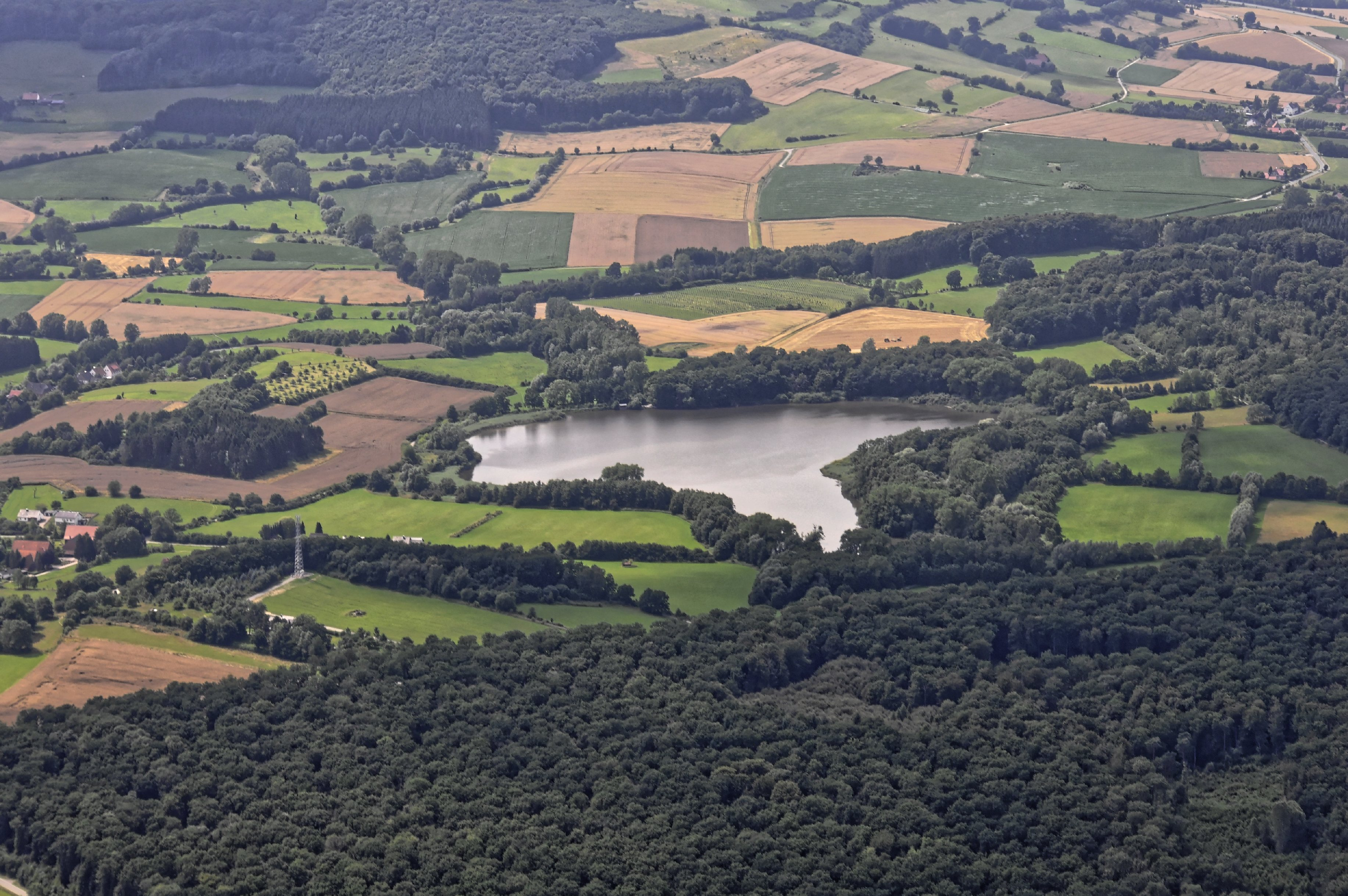 Bilder vom Flug Nordholz-Hammelburg 2015: Der Norderteich bei Belle